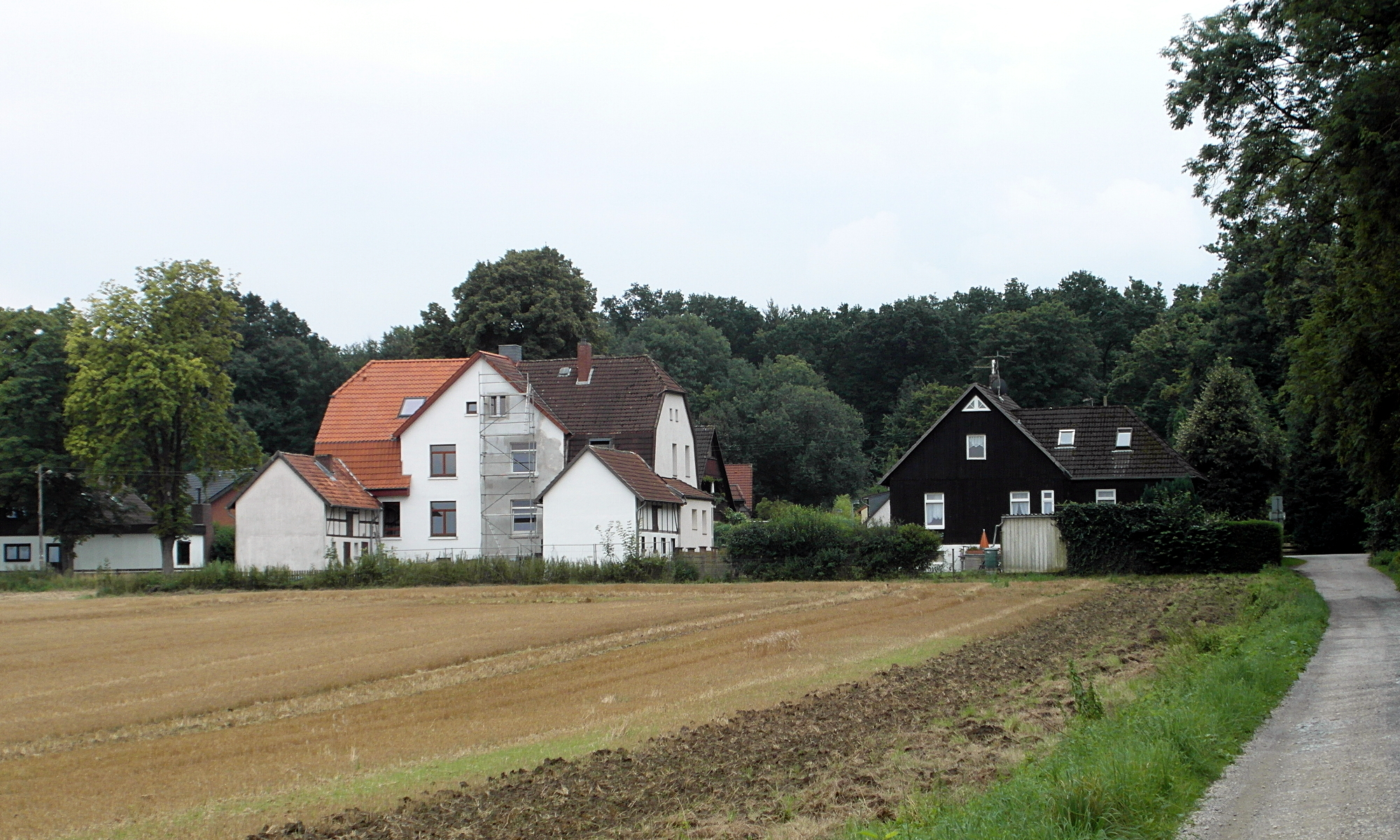 Das ehemalige Hotel/Restaurant Waldkater in der Wennigser Ortslage Waldkater